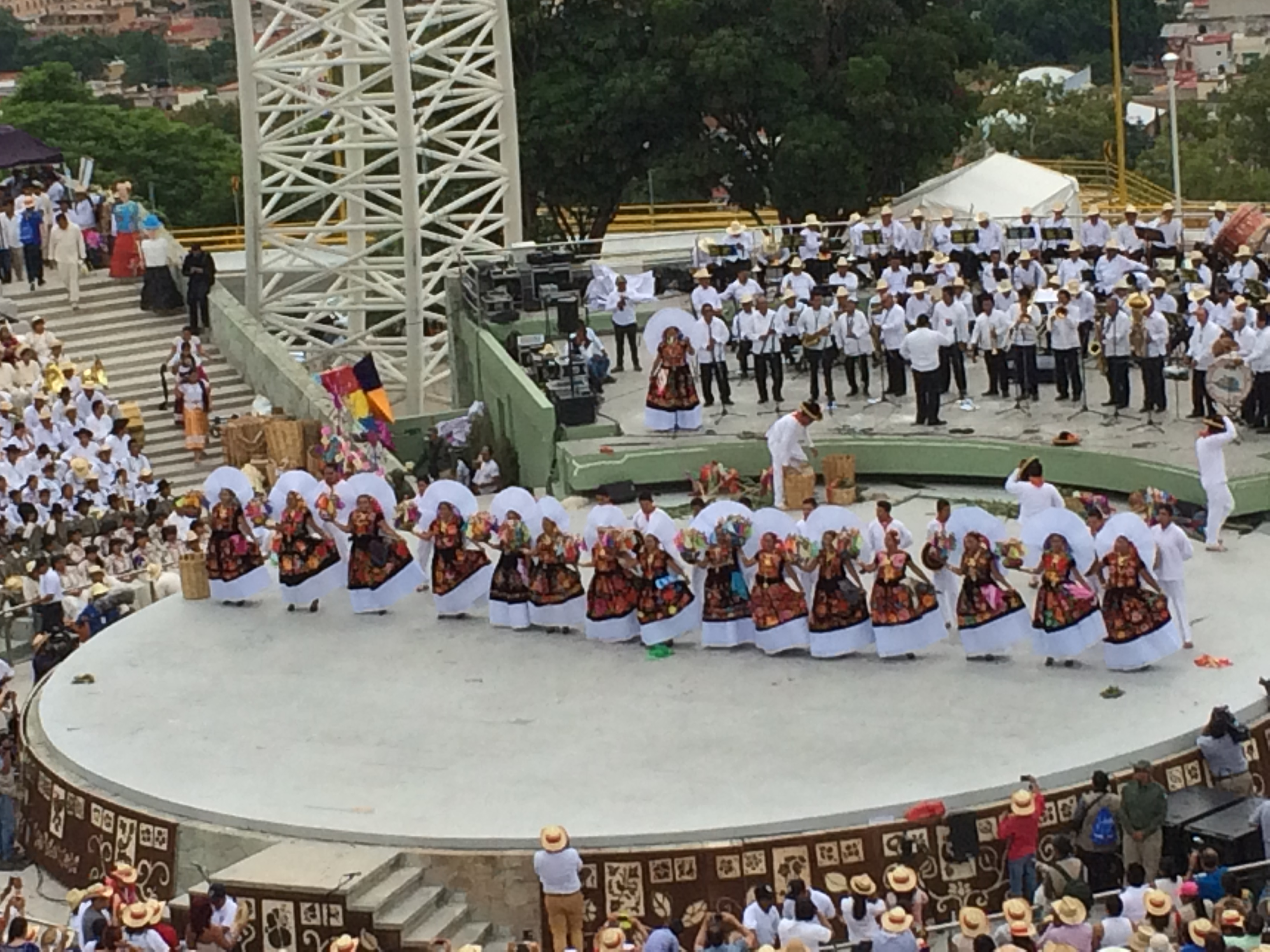 Baile del Istmo de Tehuantepec